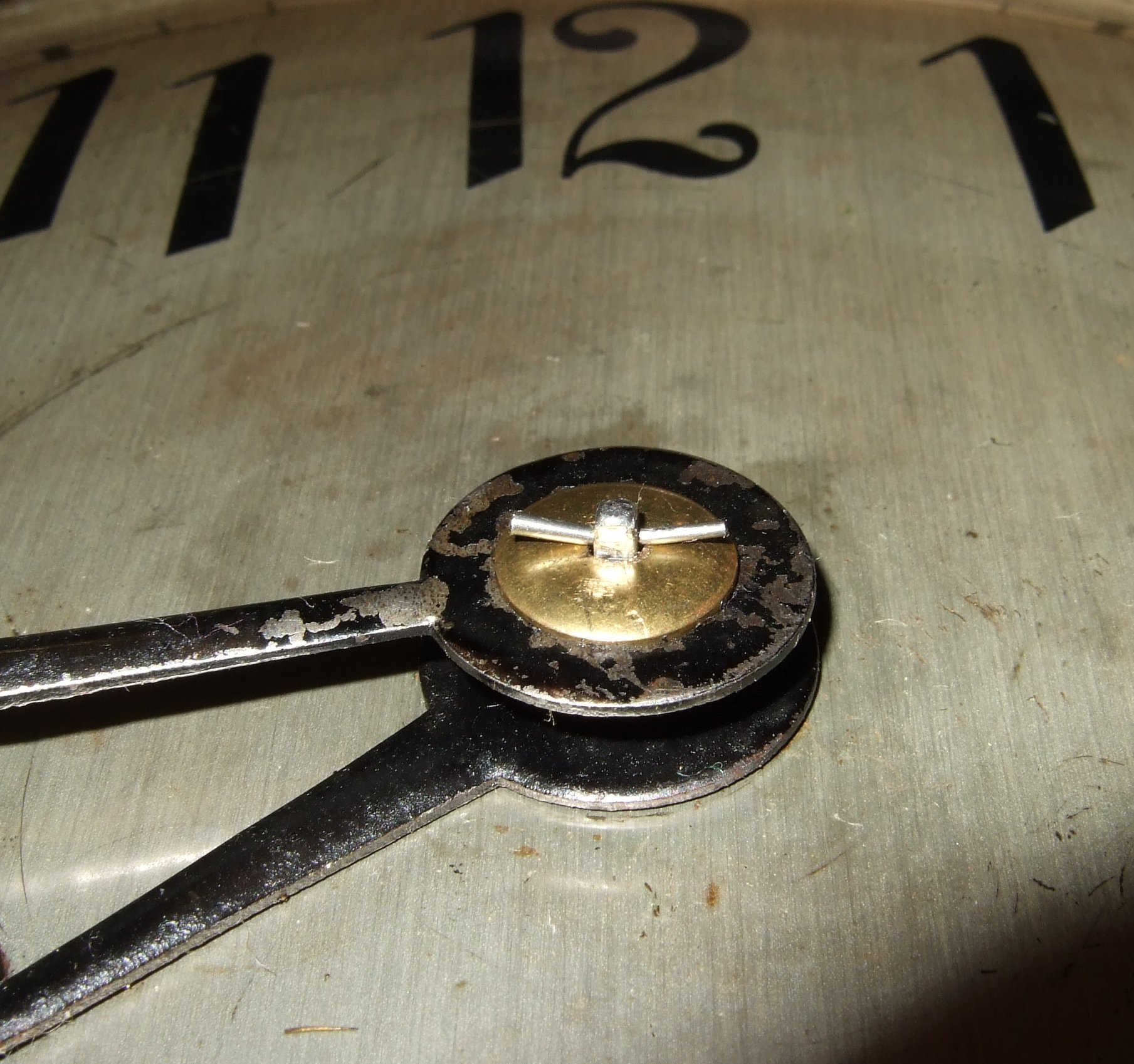 Zeiger, Zeigerscheibchen und Vorsteckstift des Zeigerwerkes.